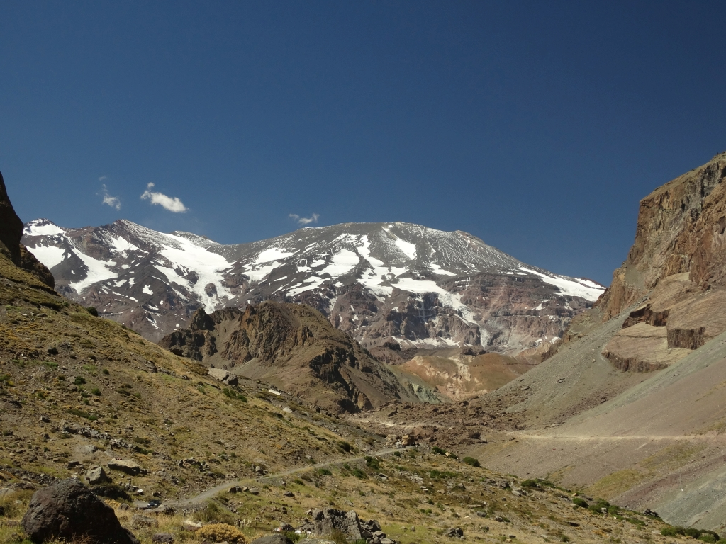 Volcán San Jose desde Baños Morales (hacia el Este)